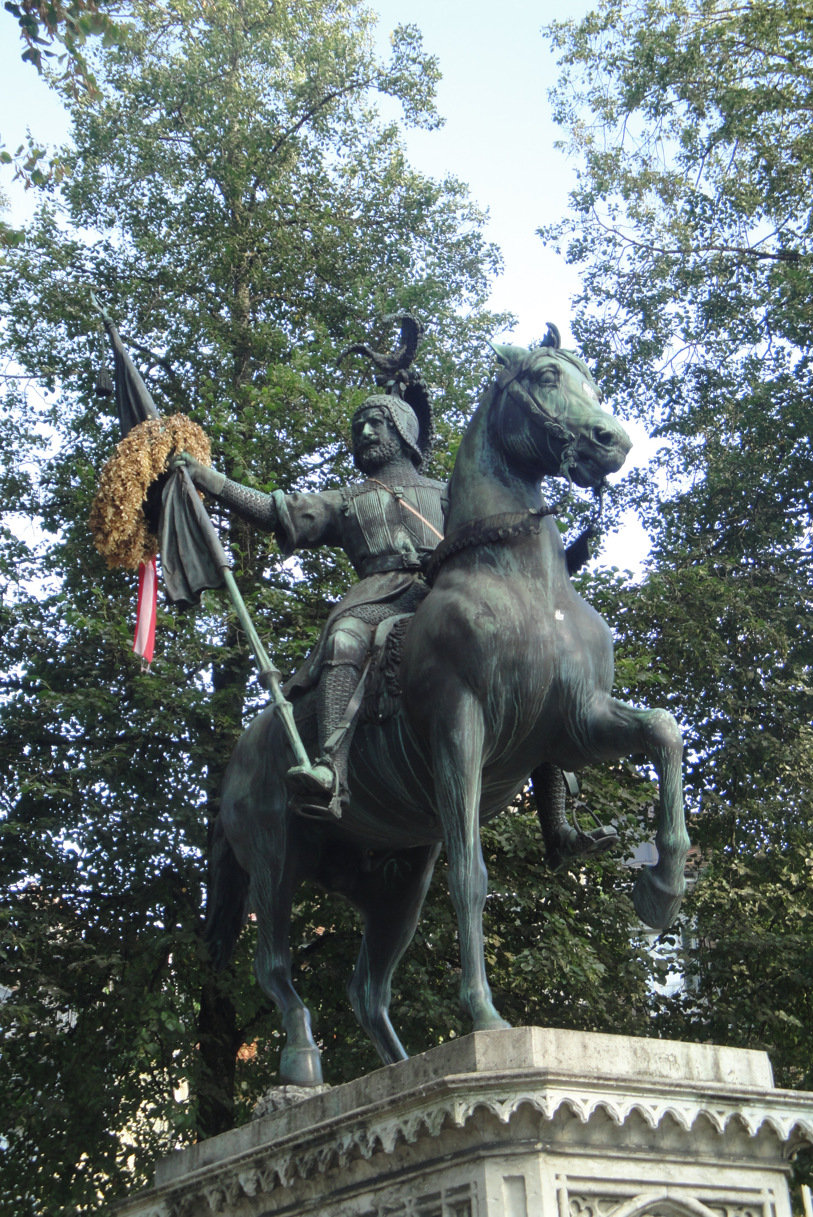 Bern, Reiterdenkmal Rudolf von Erlach